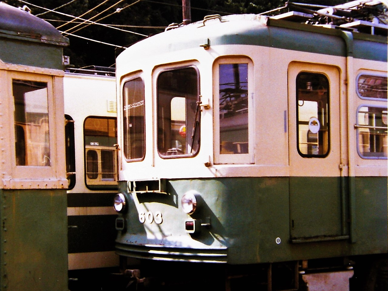 江ノ島電鉄600形 元東京急行80形 製造初年：1950年 1982年撮影